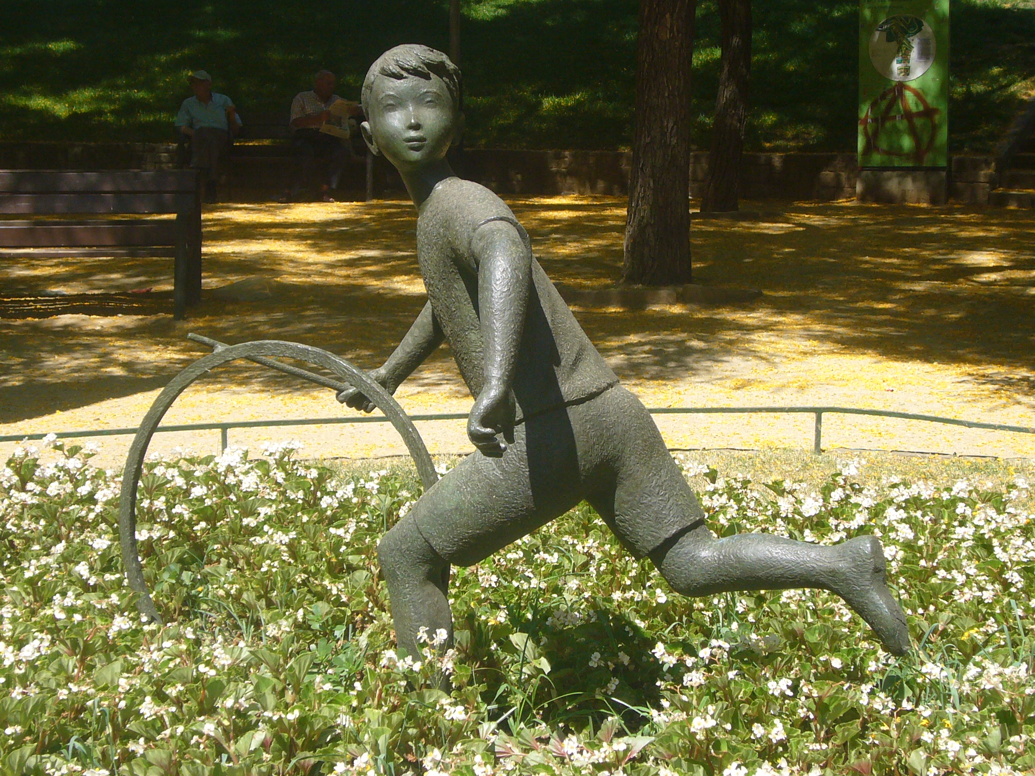 Estatua del Nen de la Rutlla, a l'entrada del Parc del Guinardó. L'estàtua del Nen de la Rutllà, situada a l'entrada del Parc del Guinardó, just a l'avinguda de la Mare de Déu de Montserrat, es va inaugurar un 28 de gener de l'any 1961. L'autor de l'escultura és Joaquim Ros i Bofarull (1906-1991), artista barceloní.